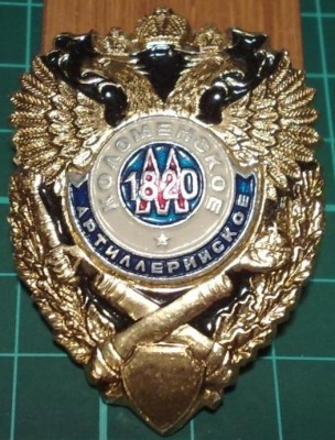 Знак об окончании Коломенского ВАКУ